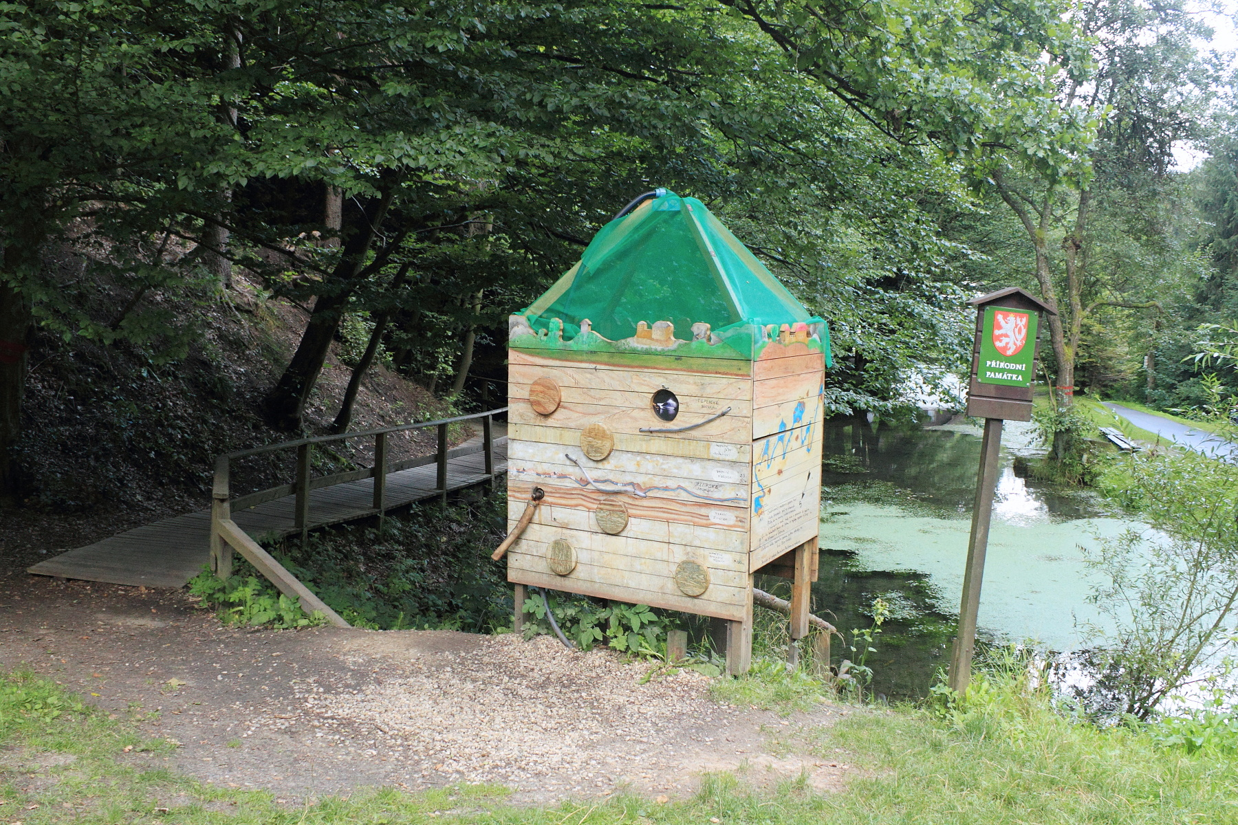 Bartošova Pec - označení